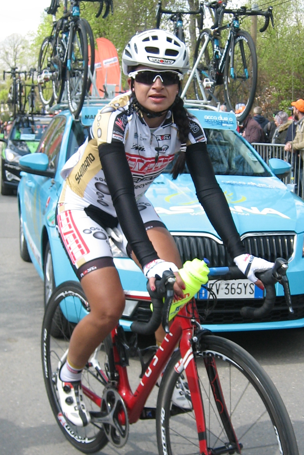 Finish van de Waalse Pijl 2017 in Huy.